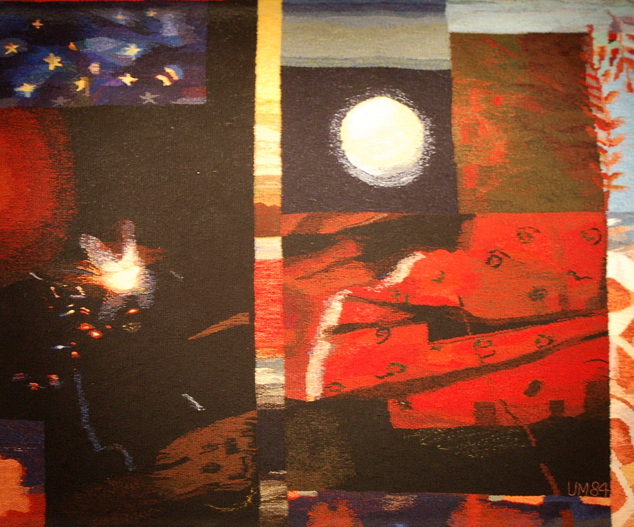 Nattresa av Ulla Magnusson utförd 1984 till Karlstads Stadsbibliotek.